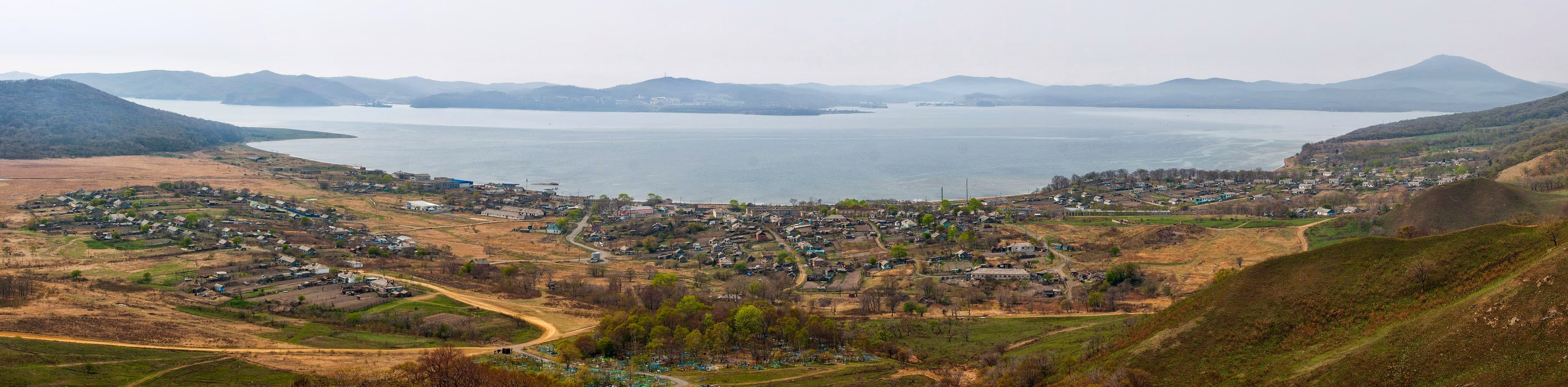 Панорама посёлка Путятин (Приморский край)